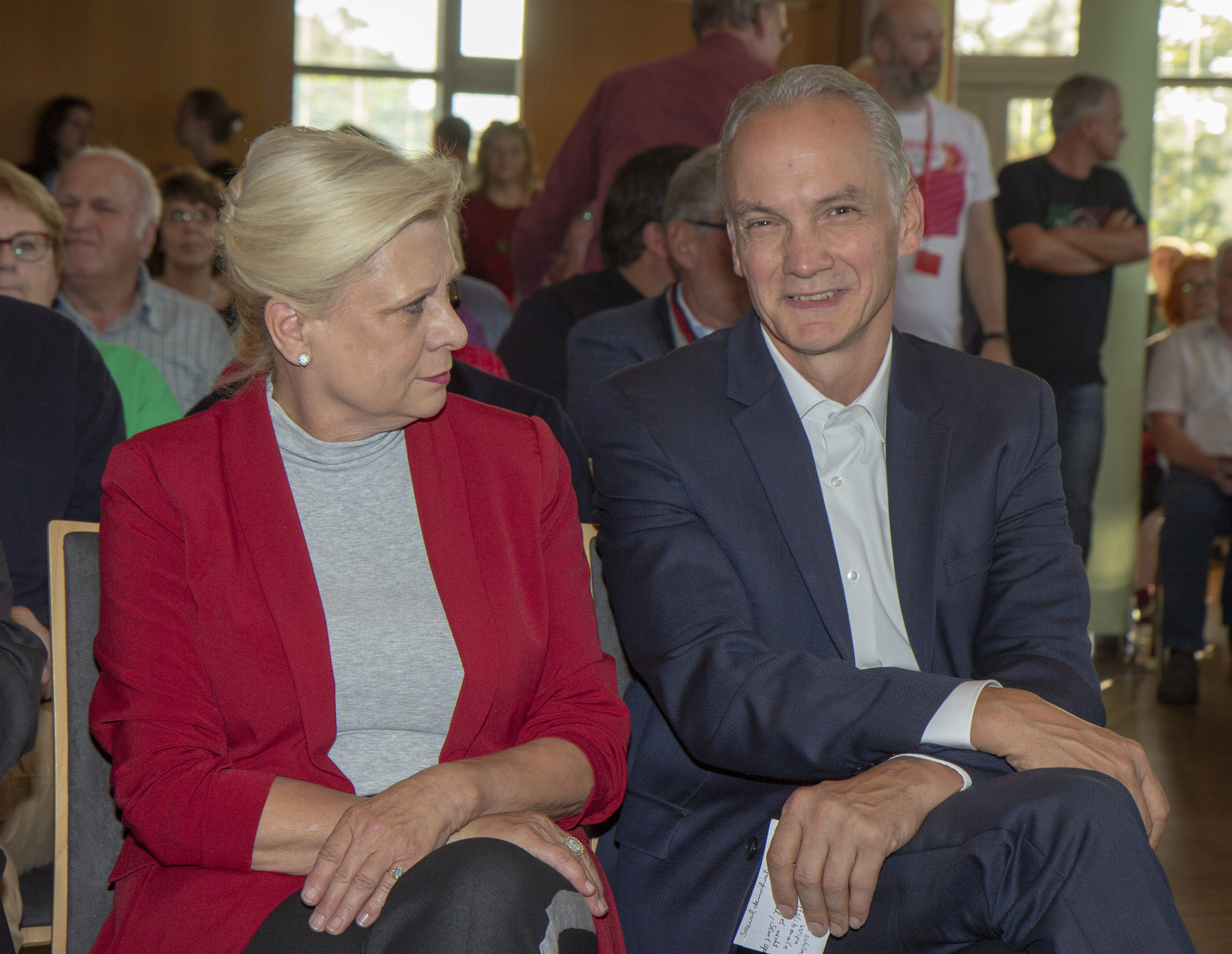 Team Hilde Mattheis und Dierk Hirschel bei der SPD Regionalkonferenz zur Wahl des SPD-Vorsitzes am 10. September 2019 in Nieder-Olm.